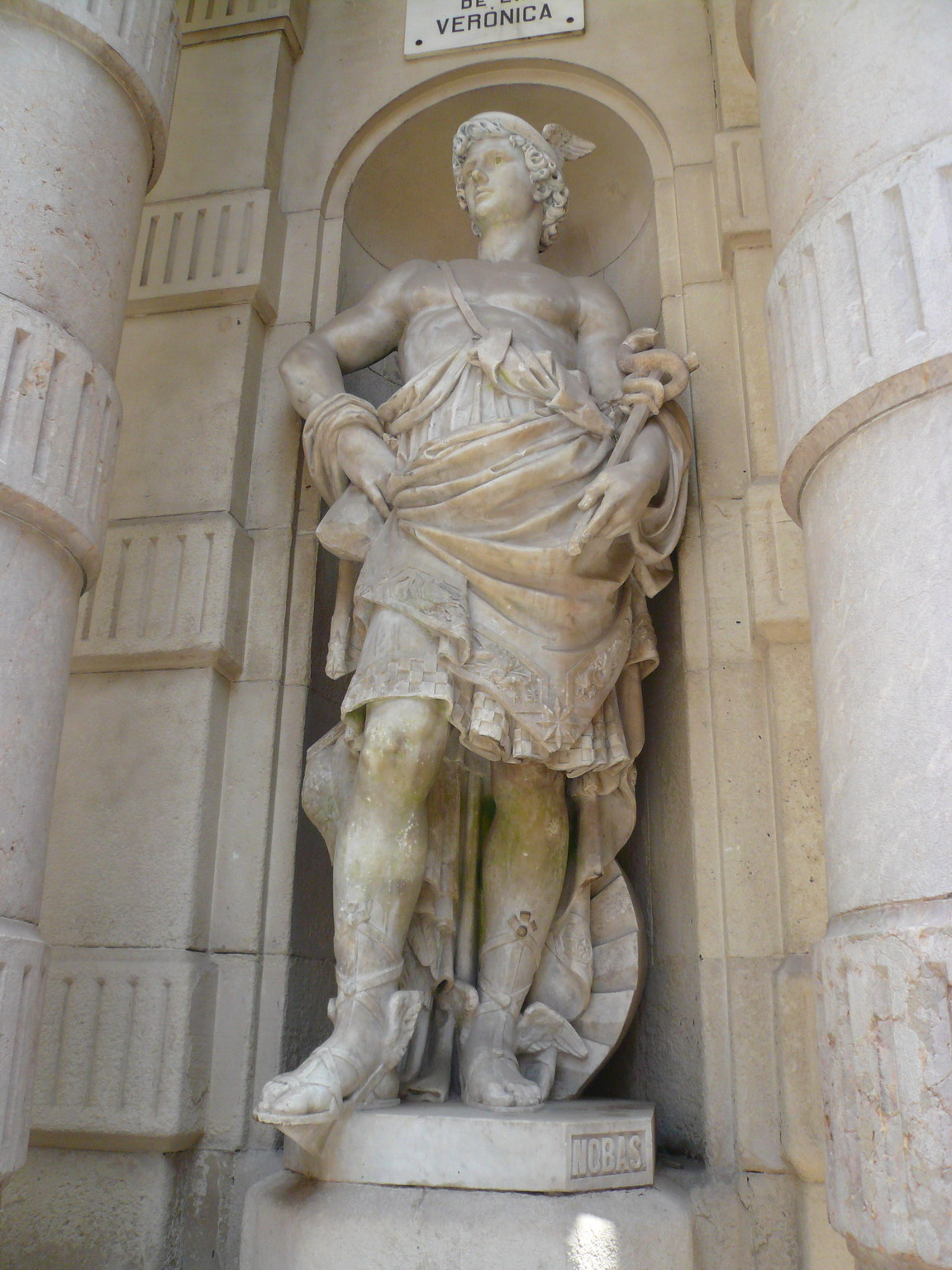 Escultura representant el déu Mercuri o el comerç a l'antic borsí